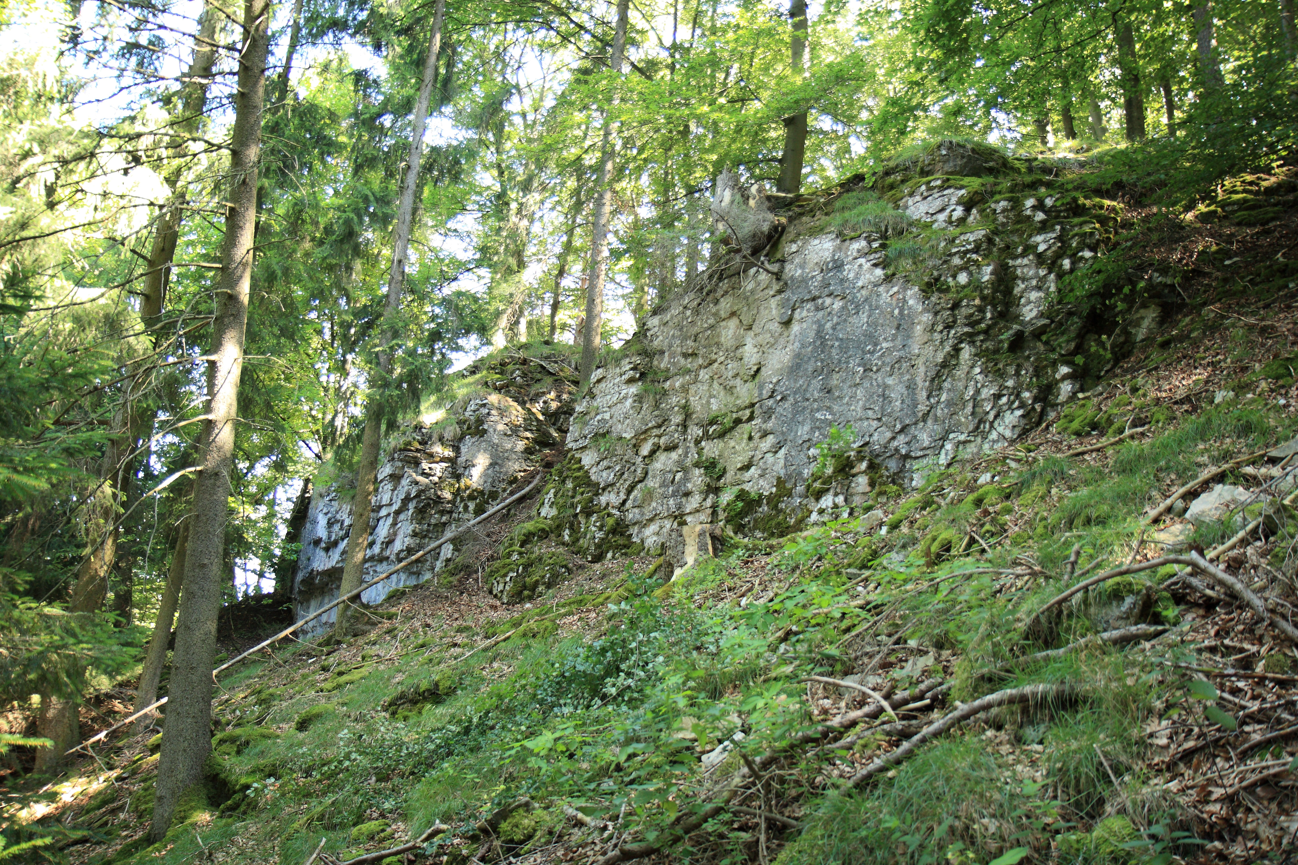 Östliche Steilwand des Burgstalls Hubertusfelsen